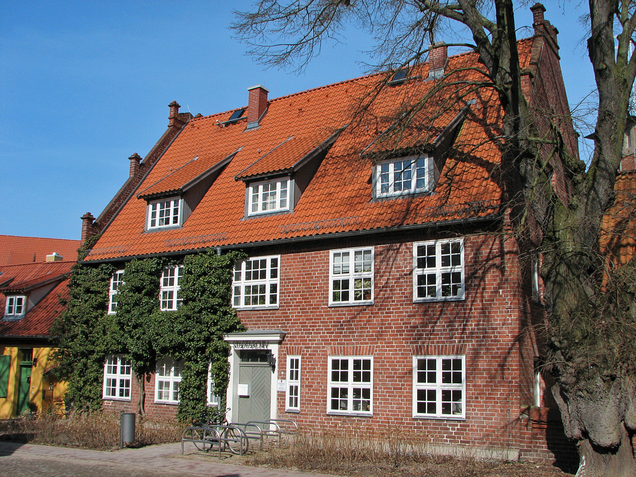 Beschreibung: Stadtarchiv von Stralsund archive of Stralsund / Germany Fotograf: Darkone, 24. März 2006